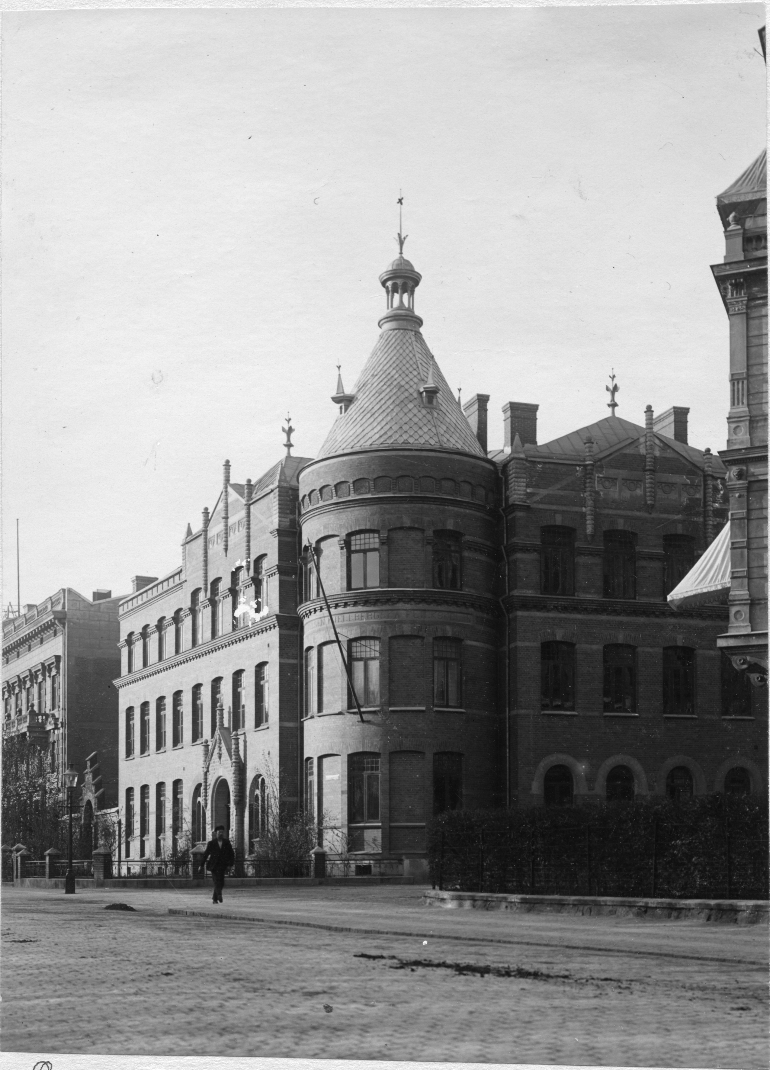 Kjellbergska flickskolan i Göteborg 1906. Bild från tidskriften Hemmets bildmaterial. Byggnaden revs på hösten 1967 för att lämna plats åt delar av ett parkeringshus.